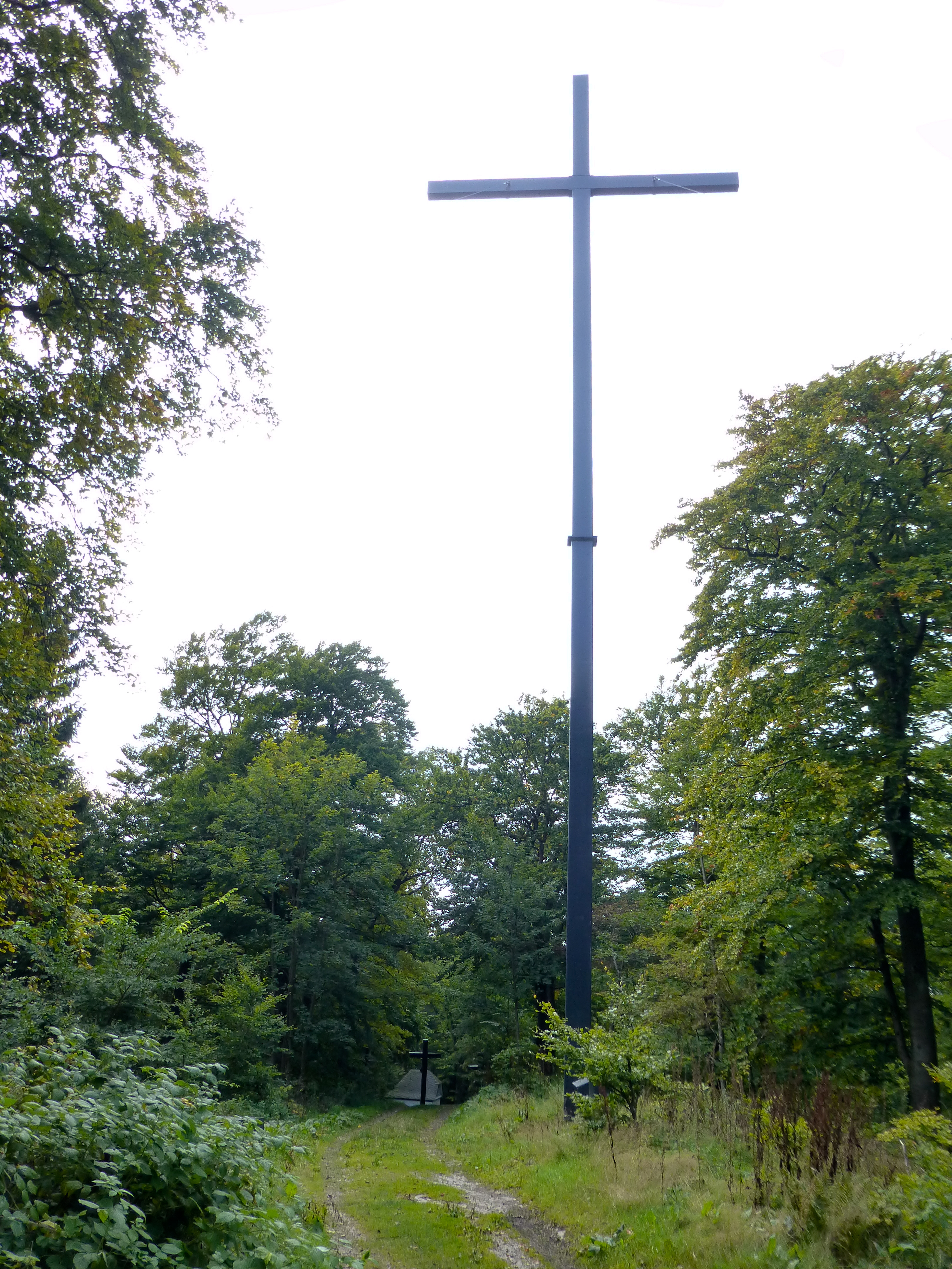 Neues stählernes Hochkreuz auf dem Wilzenberg; das Kreuz steht nicht auf dem Gipfel des Wilzenbergs sondern zwischen der Kreuzigungsgruppe und dem Wilzenbergturm